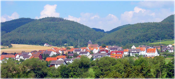 Edertal-Kleinern in der Ferienregion Edersee